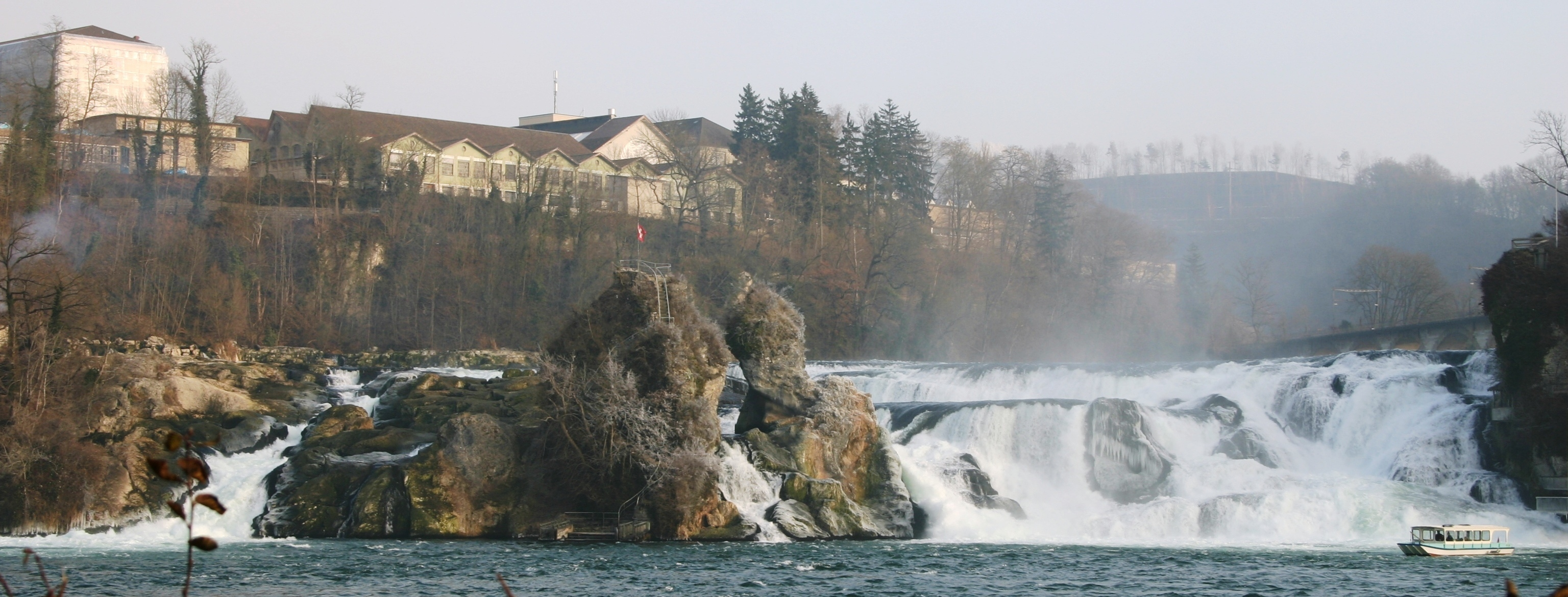 Rhäinfäll zu Schaffhausen.